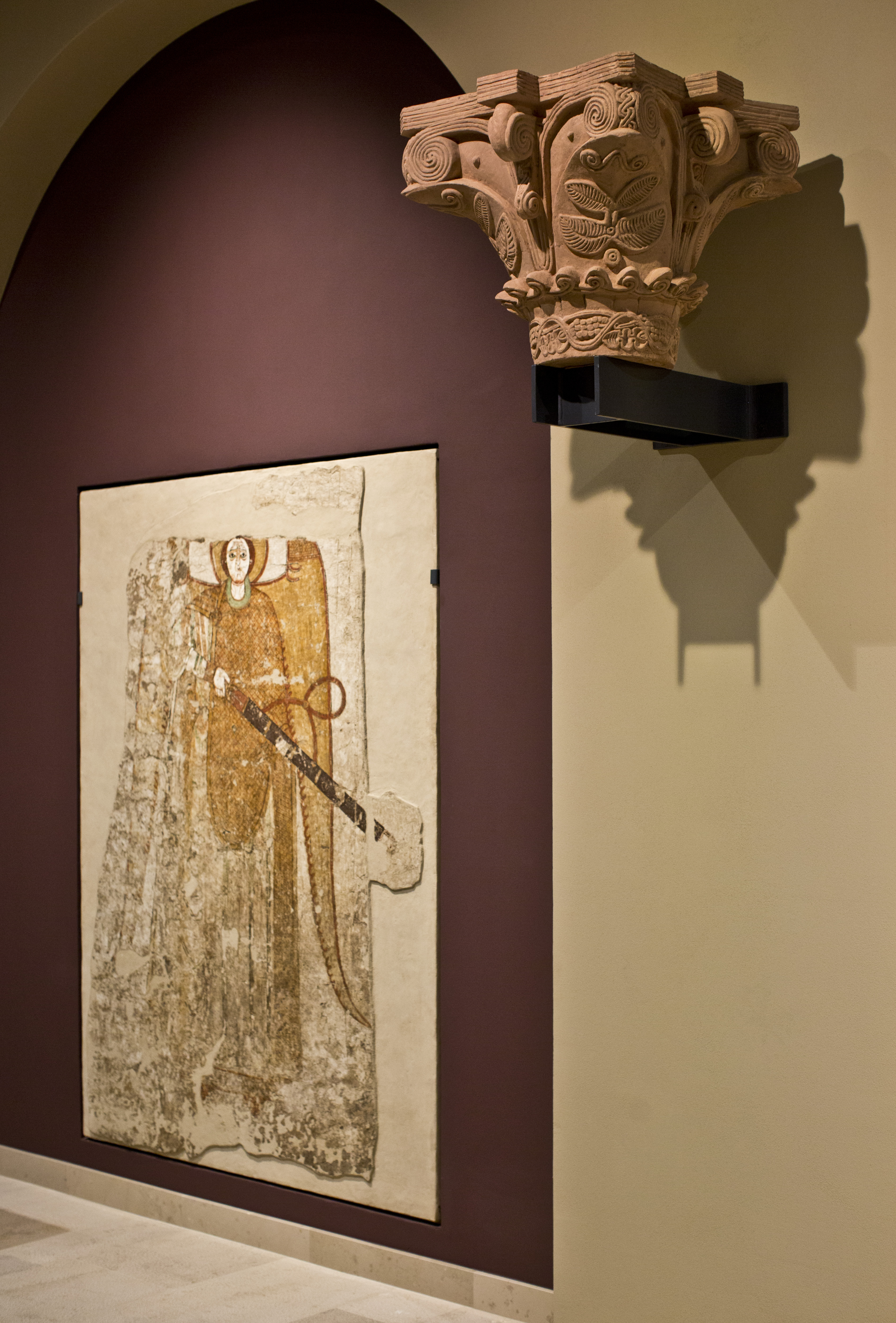 Muzeum Narodowe w Warszawie, Galeria Faras